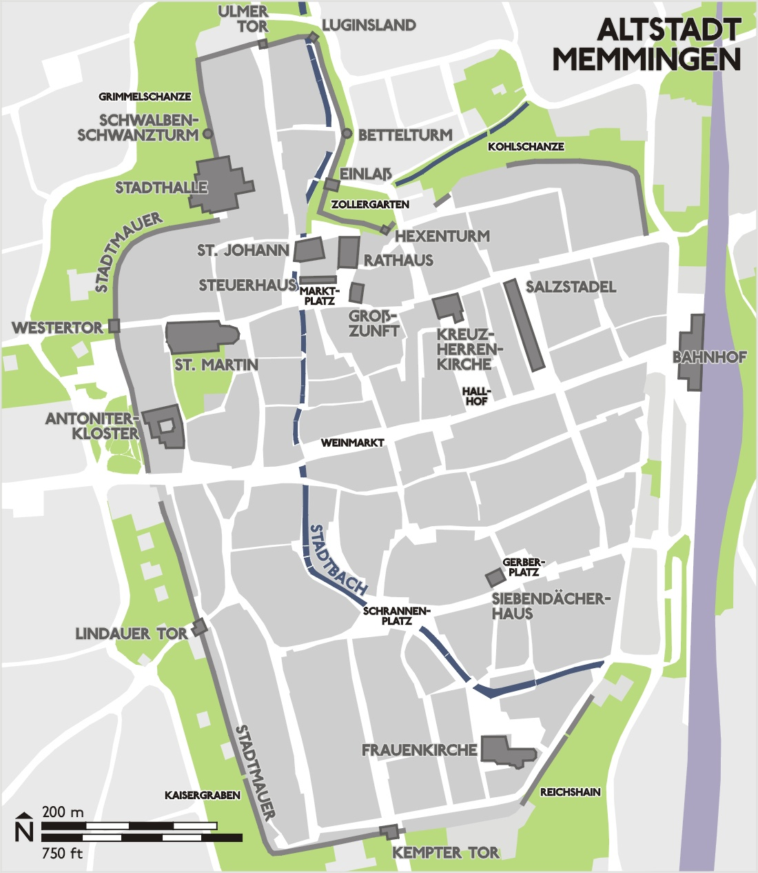 Karte Altstadt Memmingen